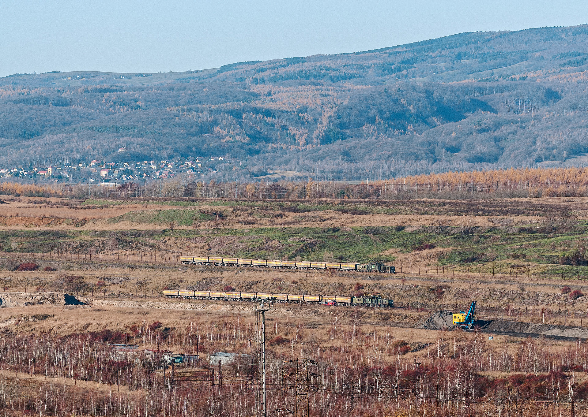 Lokomotivy typu 27E čísel 676 (dole) a 717 (nahoře) při práci v lomu Vršany.